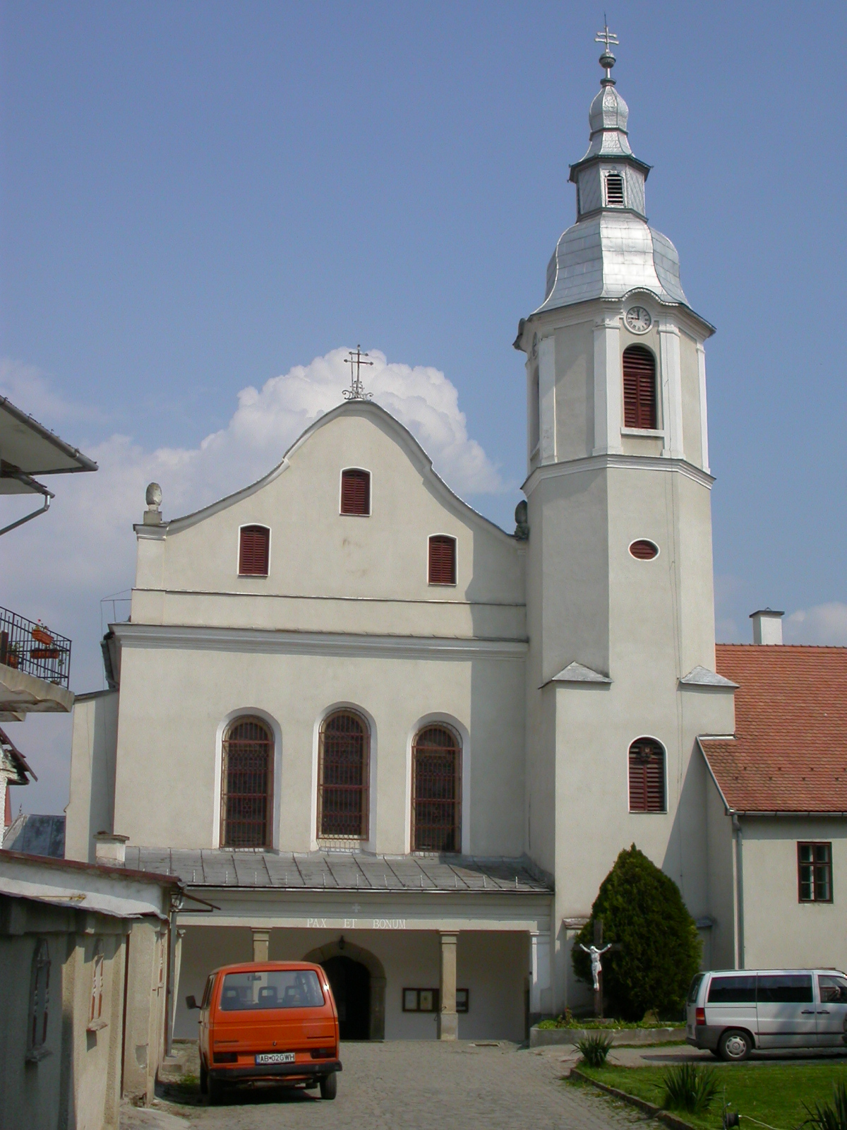 Biserica romano - catolică "Sf. Anton din Padova", sec. XVIII 01